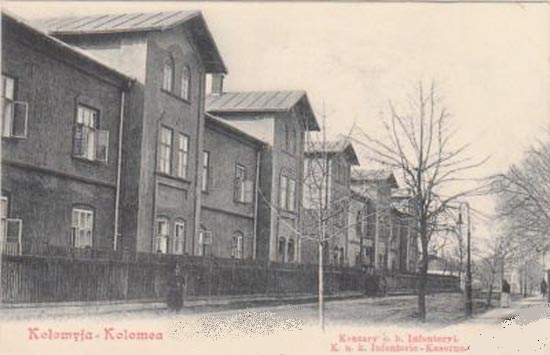 k.u.k. Infanterie-Kaserne in Kolomea